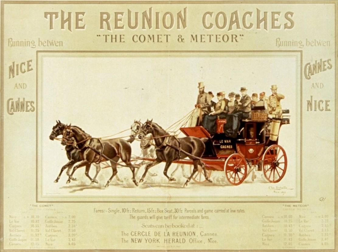 Illustration de Charles Detaille pour une affiche publicitaire intitulée The Reunion coaches "The Comet & Meteor"